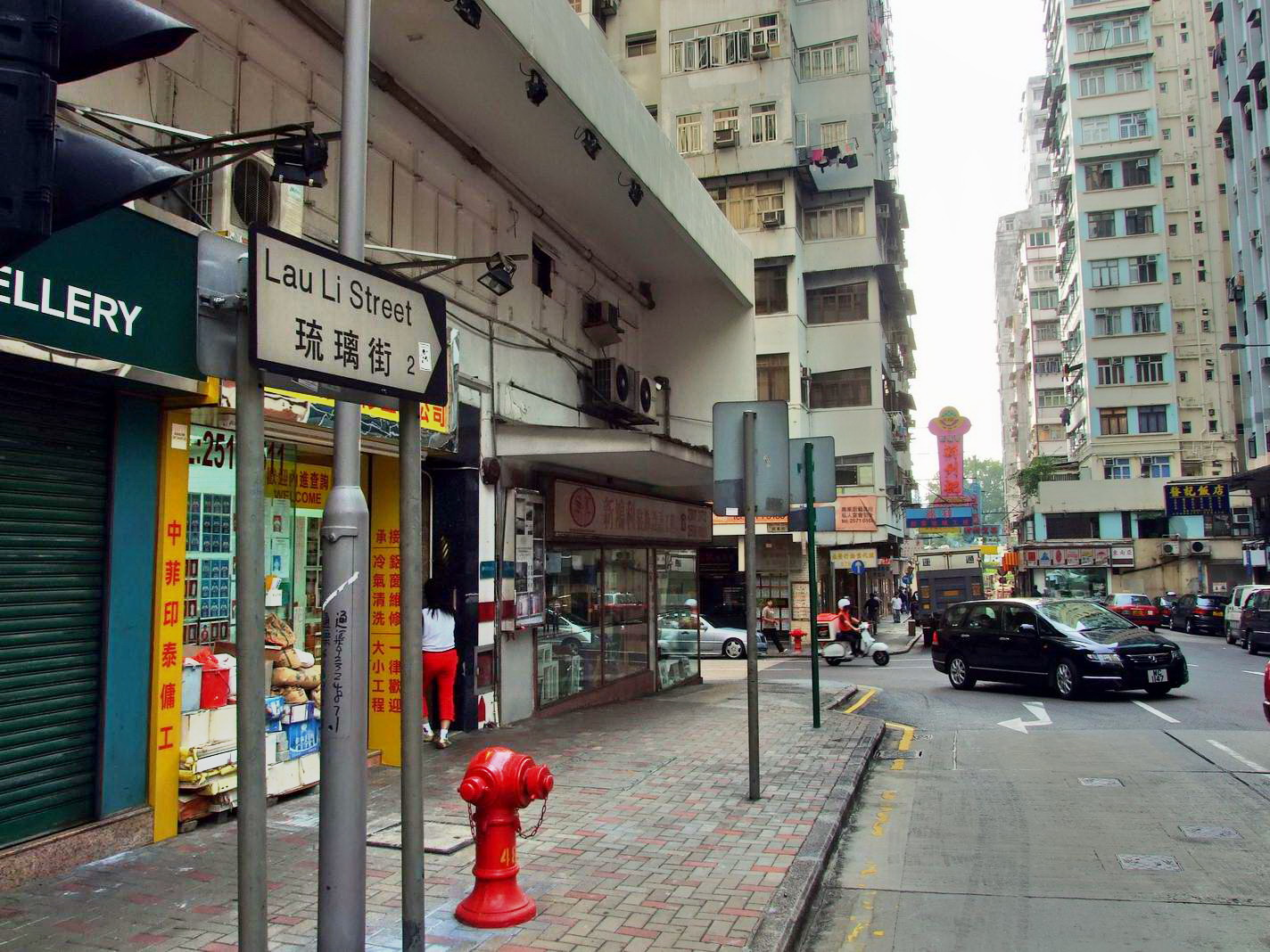 琉璃街